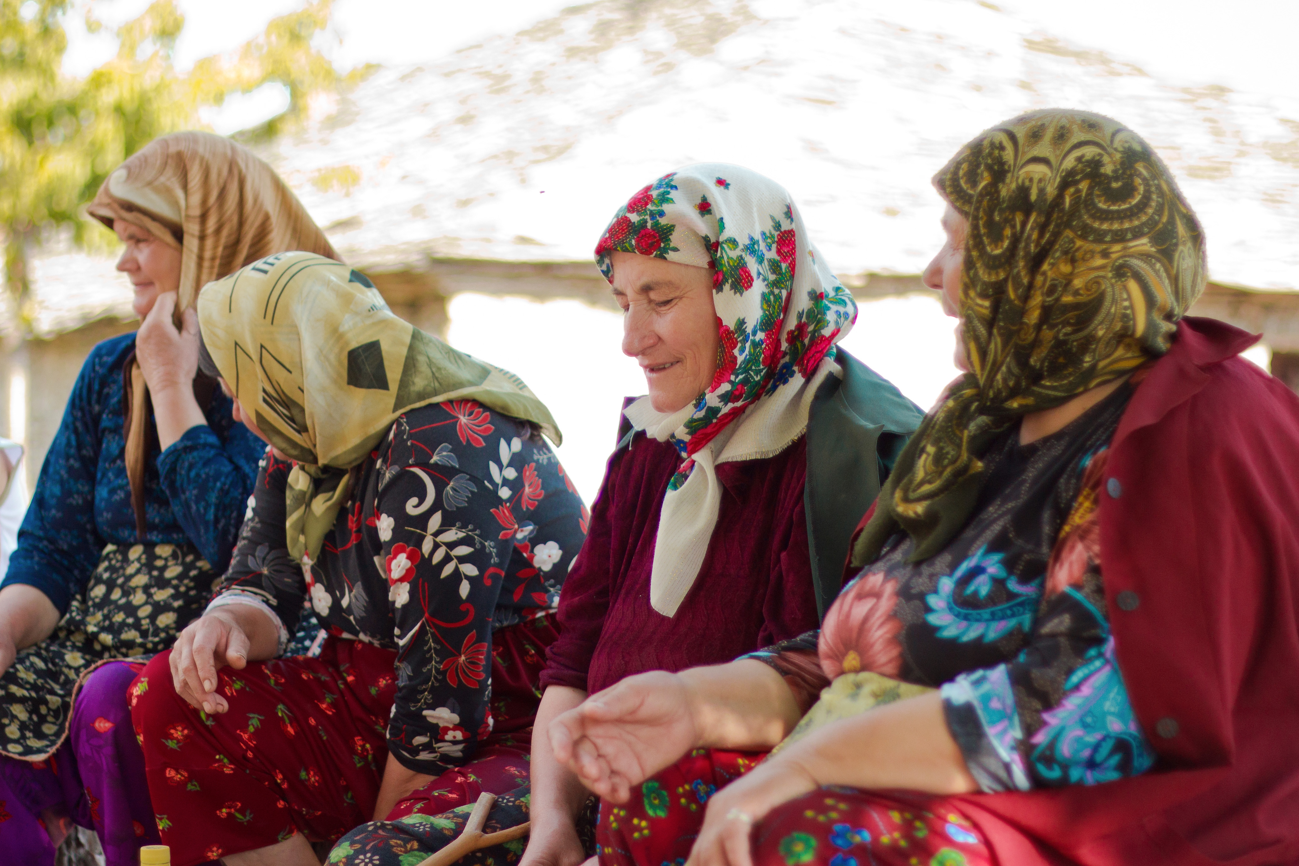 Жени почиват и говорят в Горникрай, Туховища.